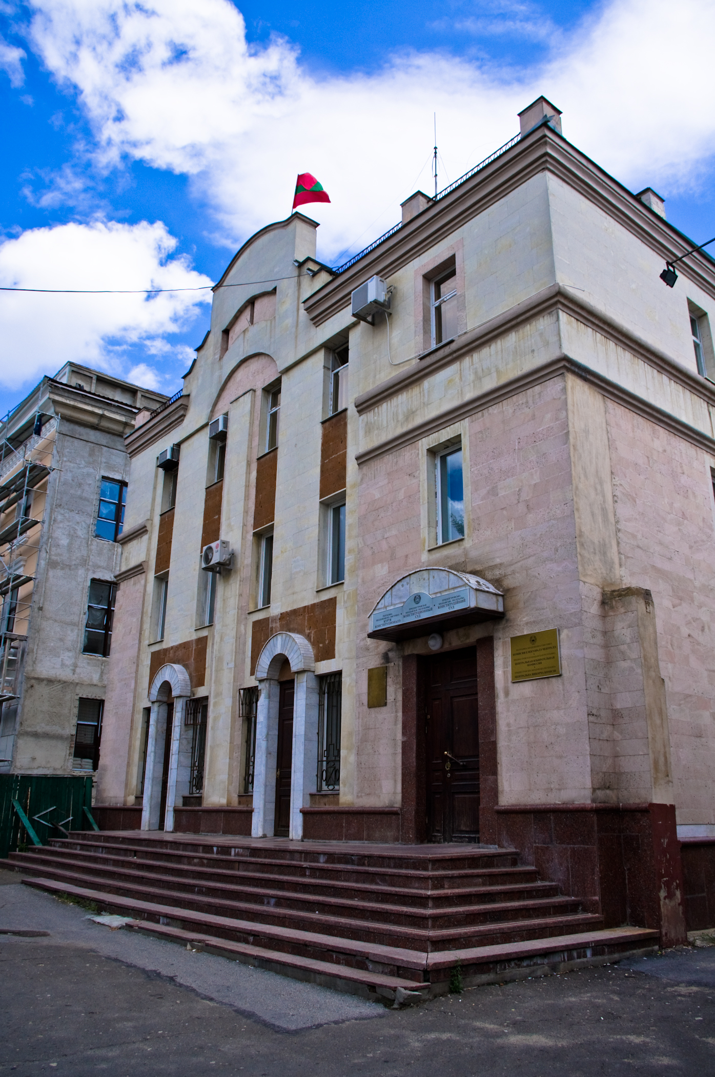 Конституционный суд ПМР и Центральная избирательная комиссия ПМР. В данный момент времени оба вышеуказанных учреждения располагаются в одном здании. Строящееся здание в крайнем левом углу фотографии - это будущий новый конституционный суд (здание уже строится лет семь).